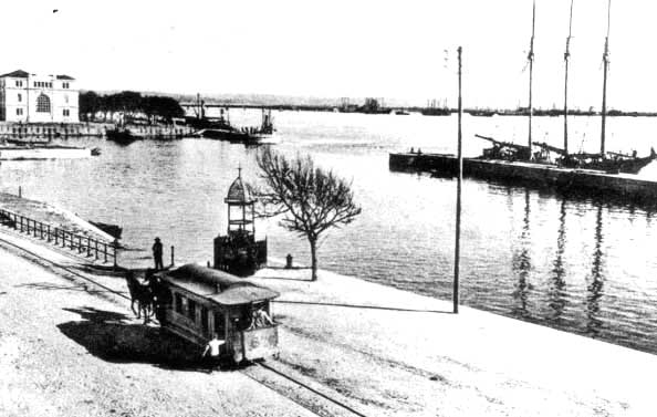 Carro americano da Figueira da Foz junto ao porto.